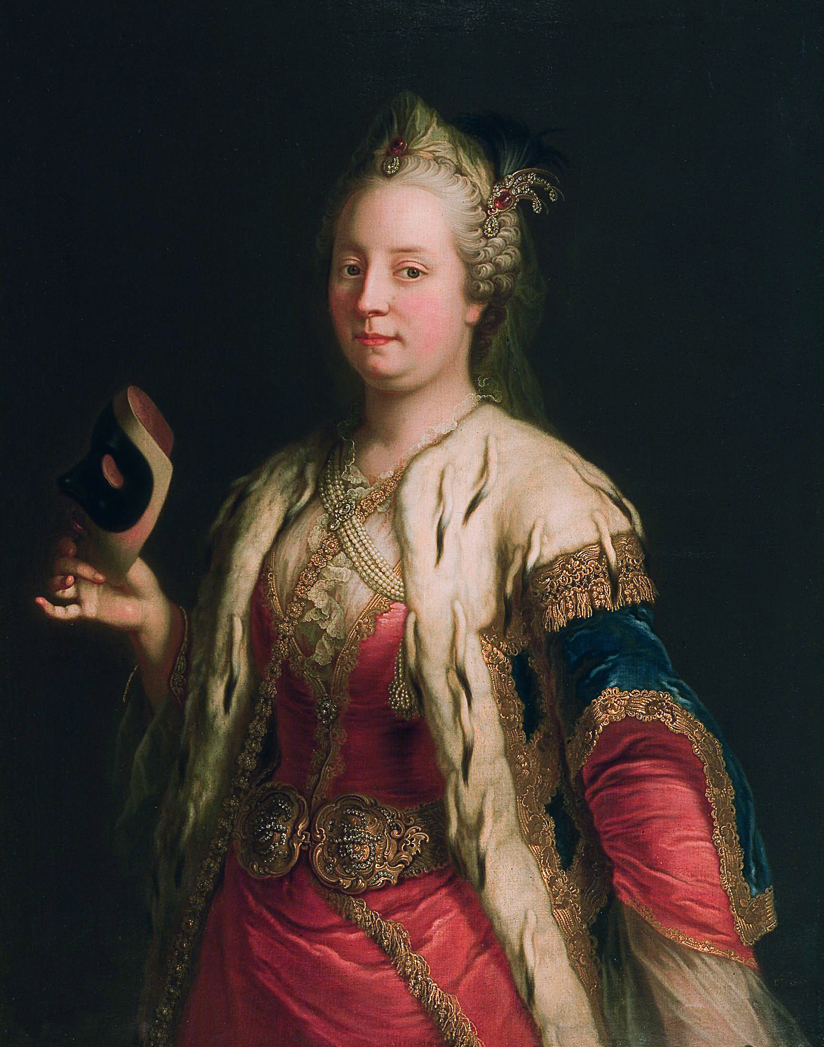 Maria Theresia mit Maske, Ölgemälde von Martin van Meytens